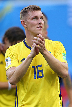 Сборная Швеции зрелищно вышла в четвертьфинал ЧМ-2018